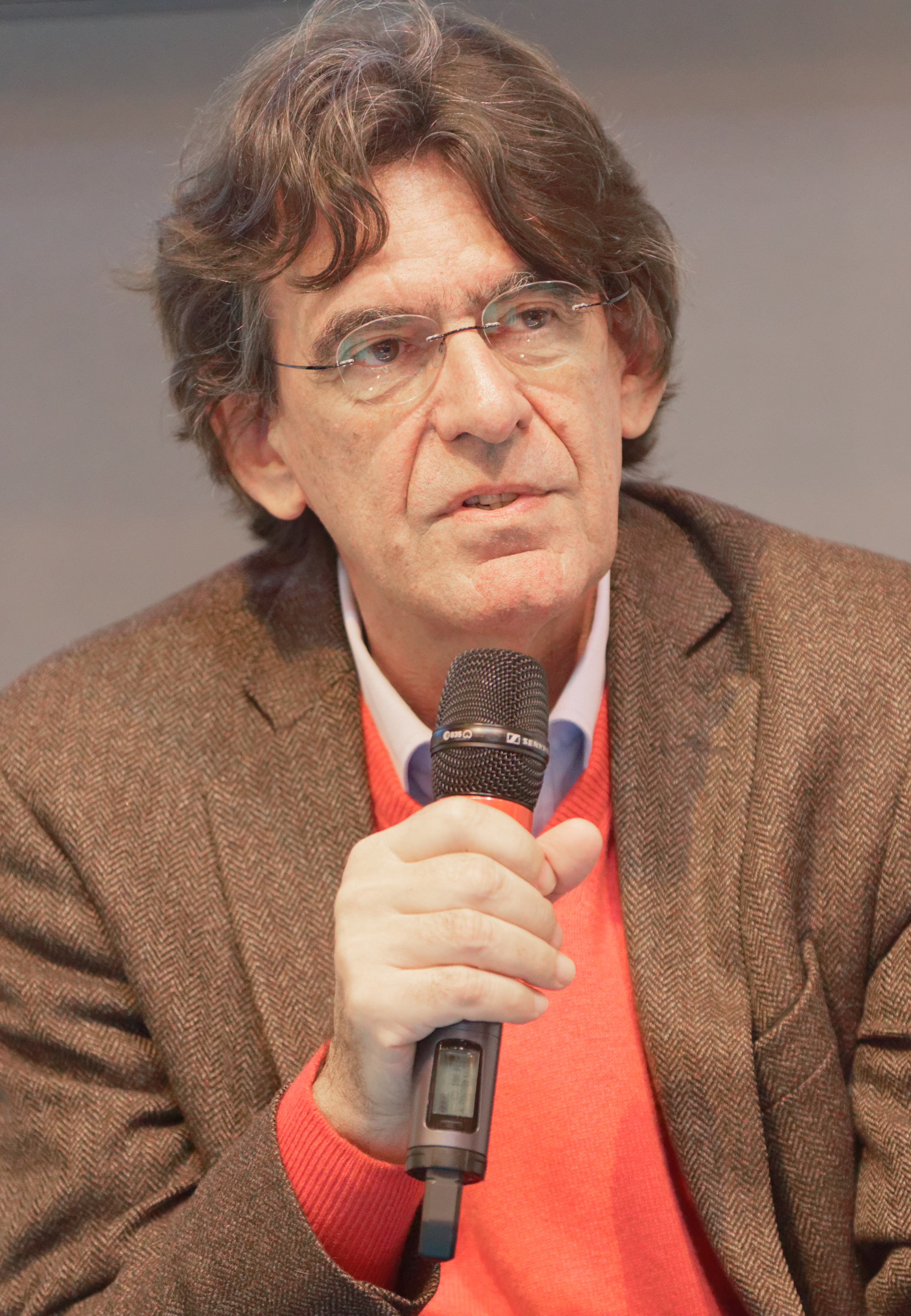 Luc Ferry en conférence lors du salon du livre de Paris 2017.